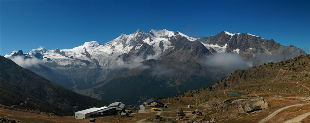 Mischabel kalnų masyvas. Dom viršūnė. Šveicarija